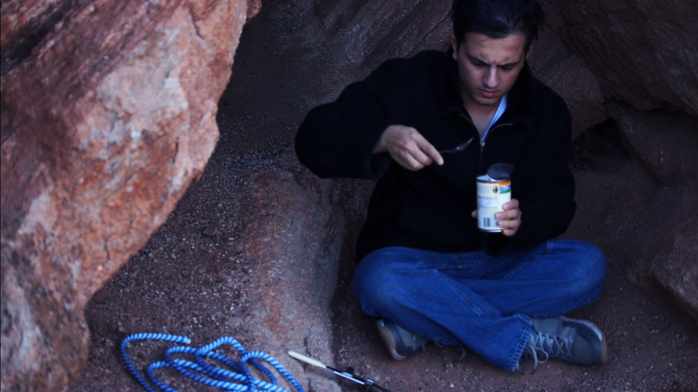 کوردی: وێنەی دیمەنێک لە ڕاپۆرتەکەی ٢٠٠٠